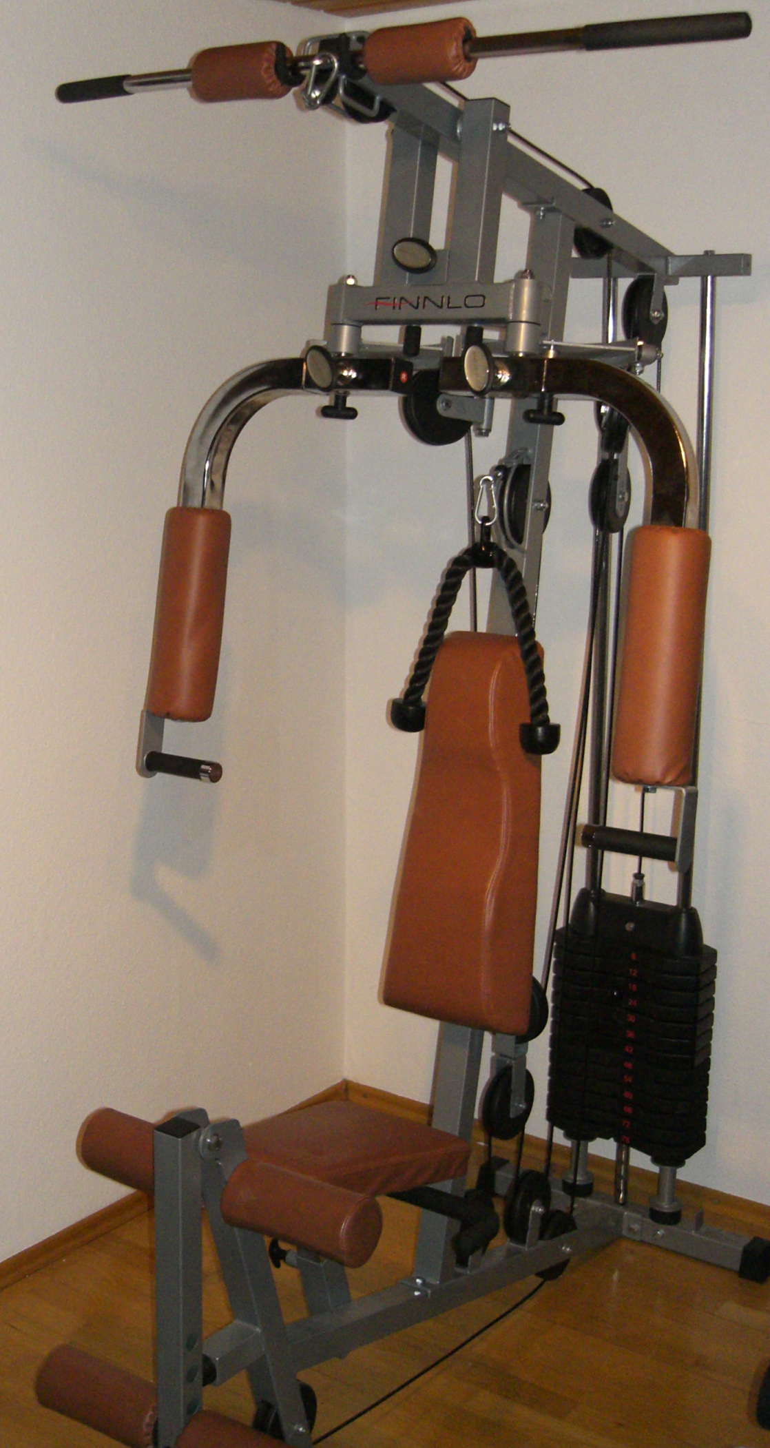 Fitnessgerät im Heimgebrauch für das Training mehrerer Muskelpartien